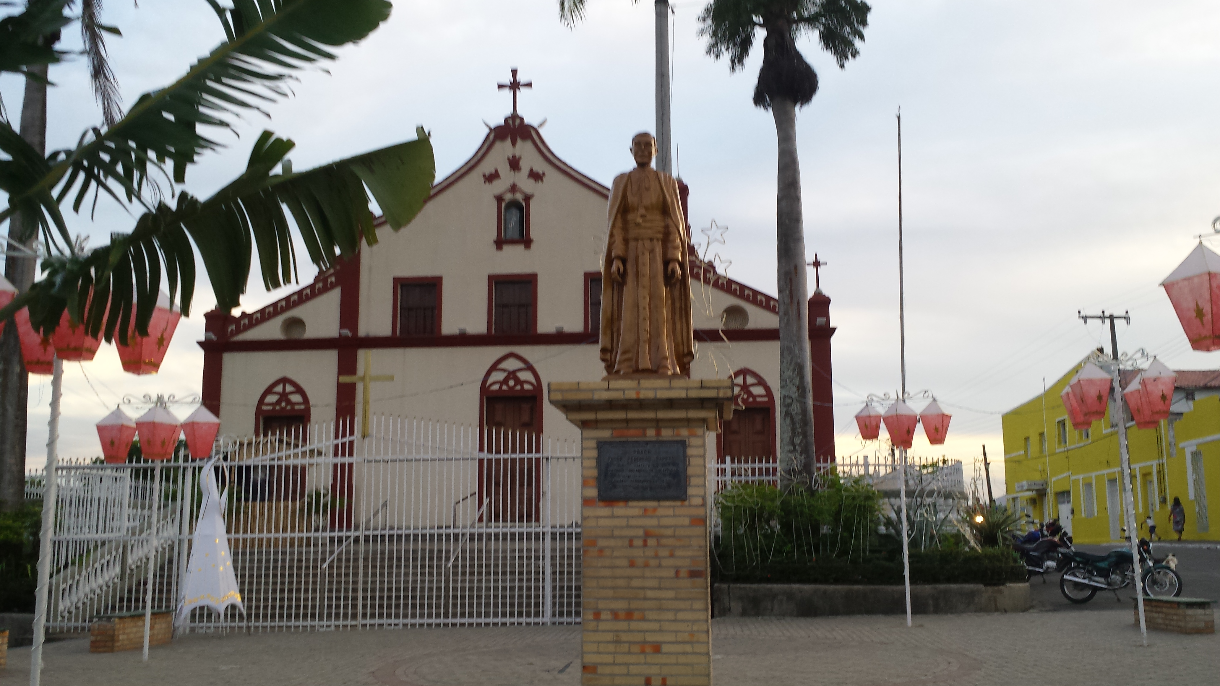 Palmácia-CE